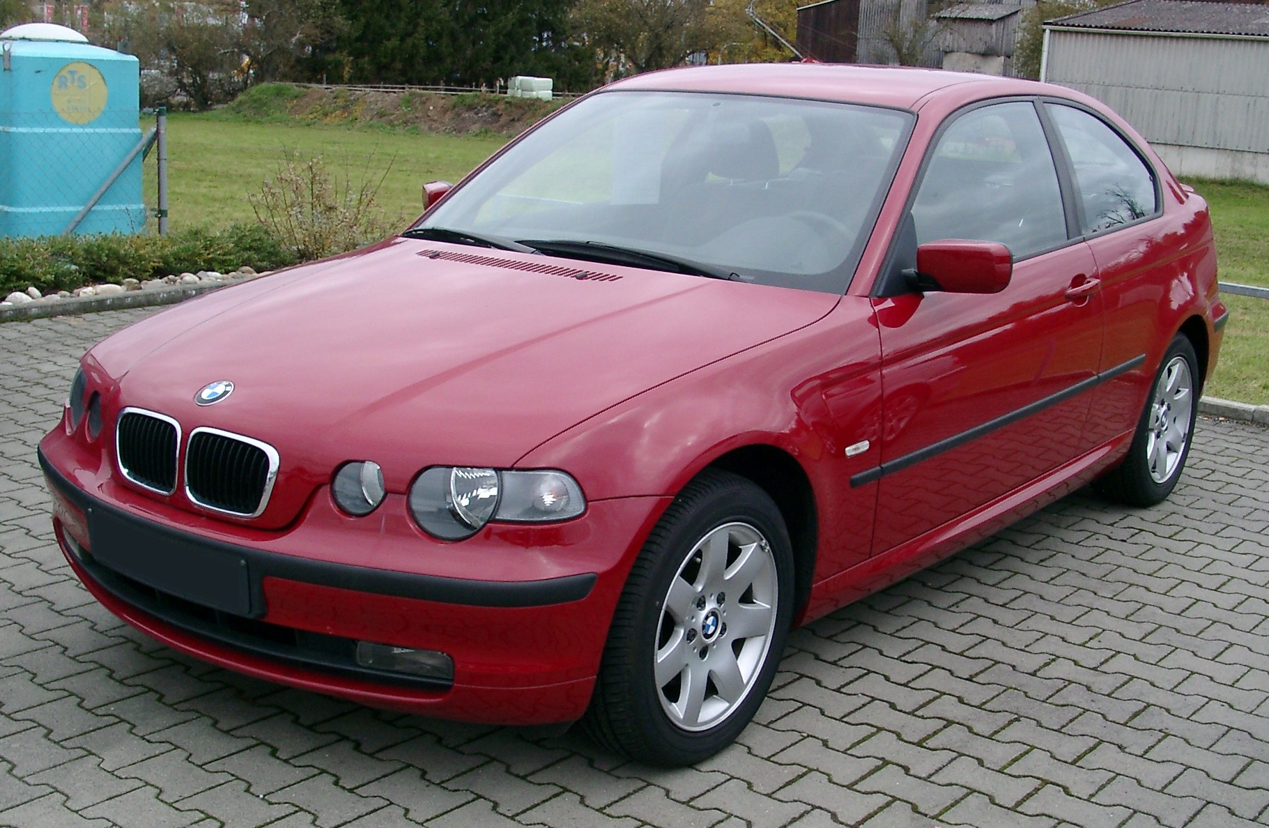 BMW E46 Compact